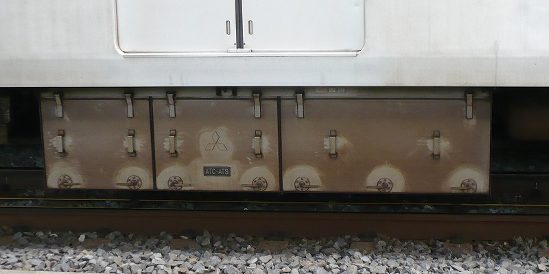 地下鉄03系機器